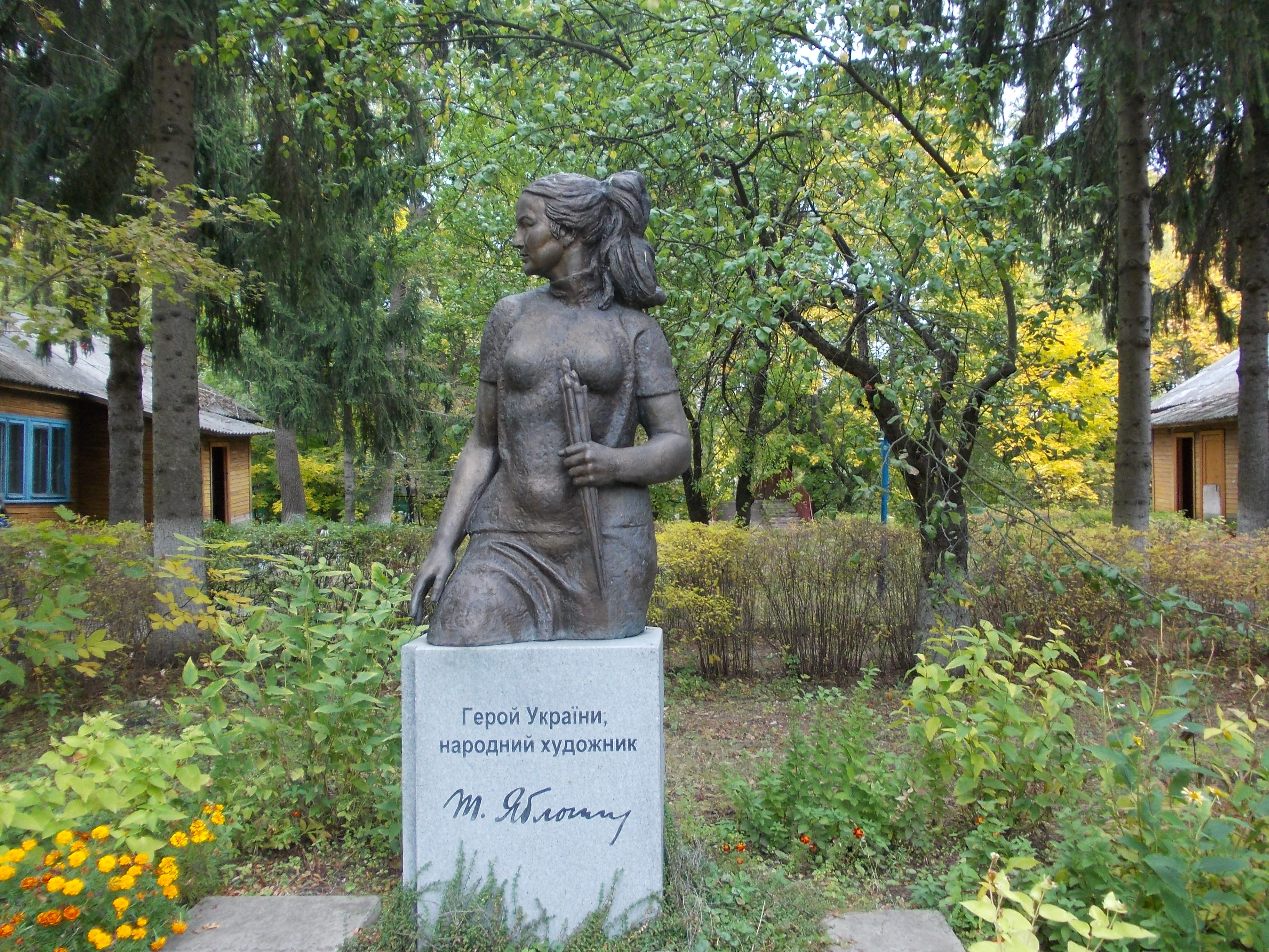 Пам’ятник Тетяні Нилівні Яблонській – народній художниці України, лауреату Національної премії ім. Т. Шевченка, Герою України, Седнів, вул. Шевченка, 59